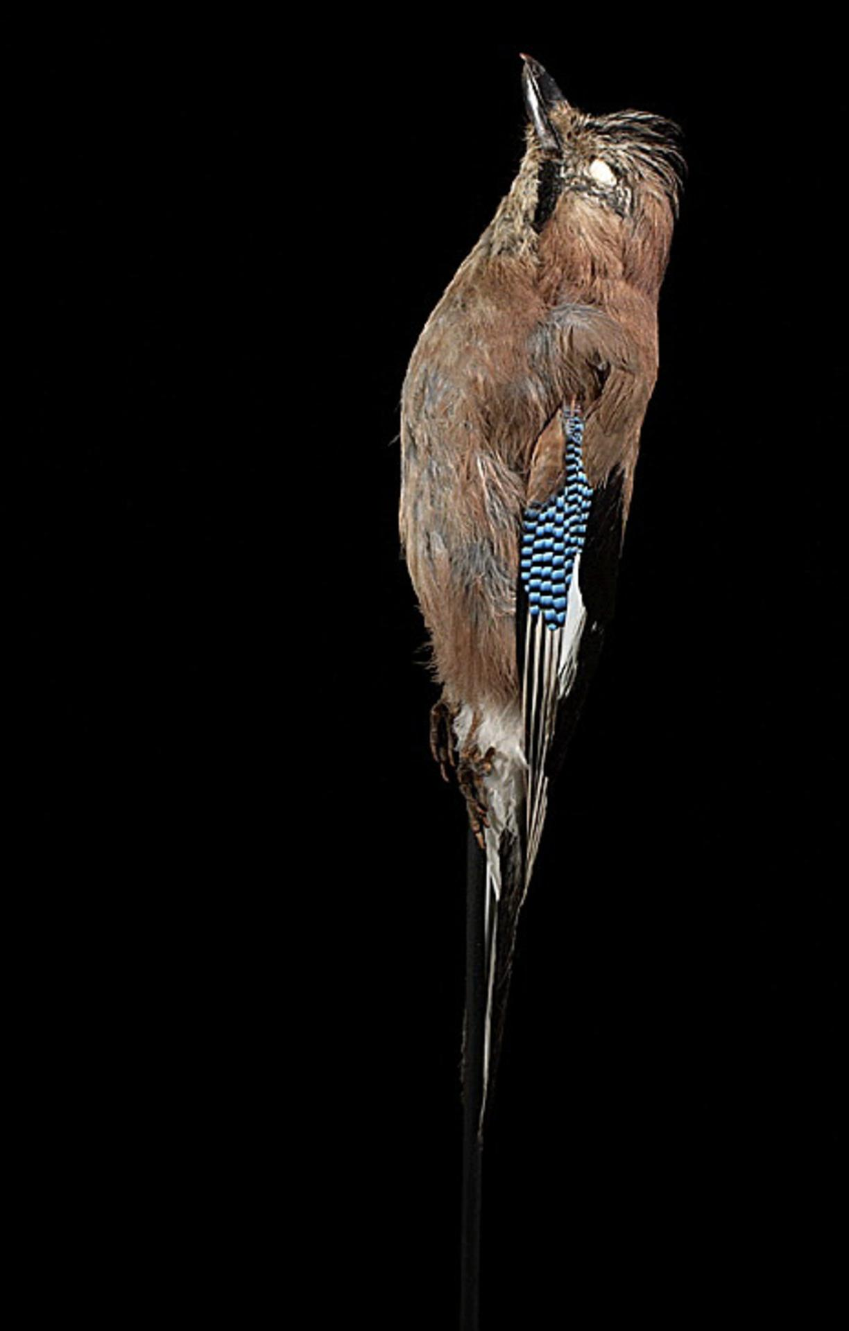 Garrulus glandarius yugoslavicus Linnaeus, 1758